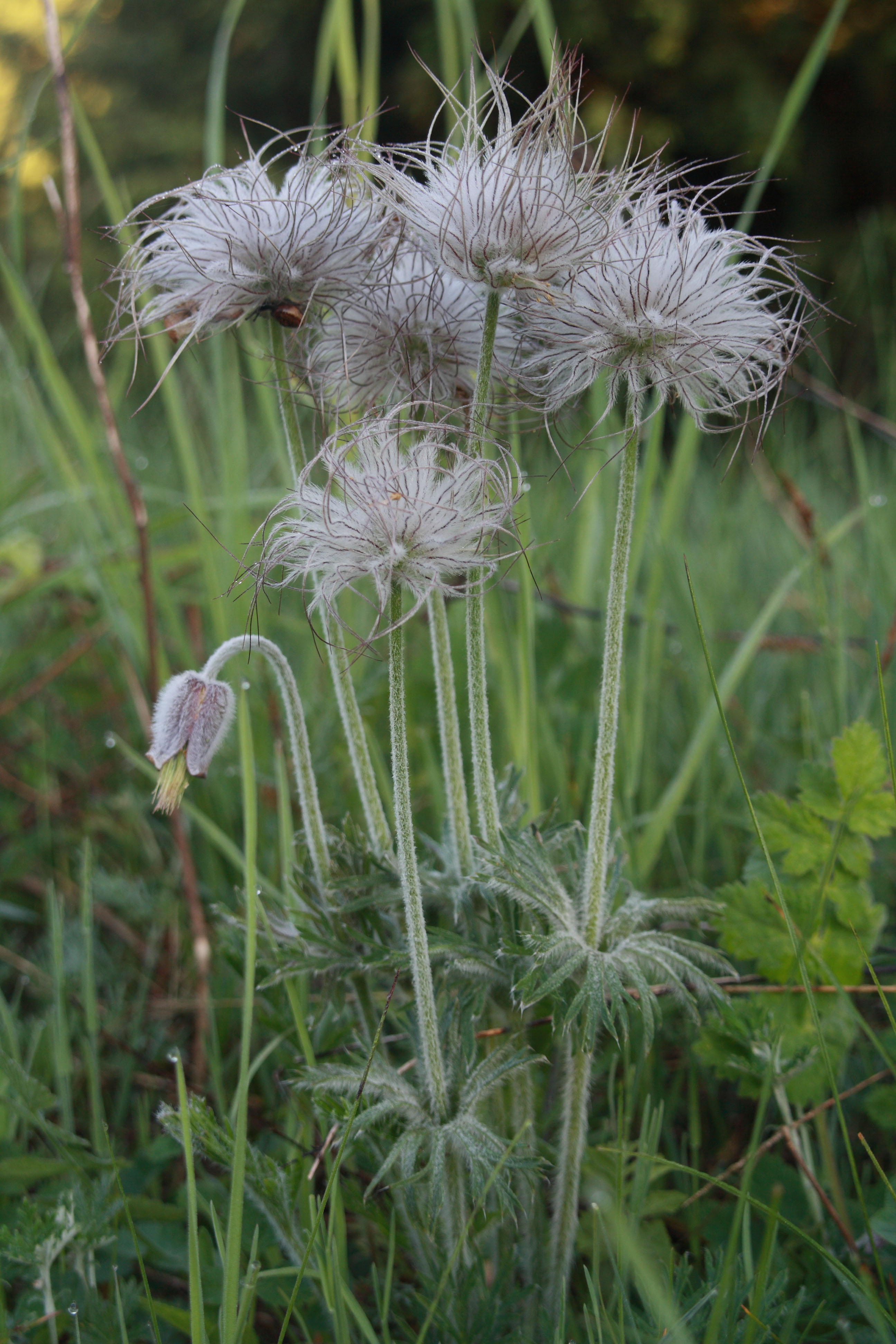 Aas-karukell. Roomassaare